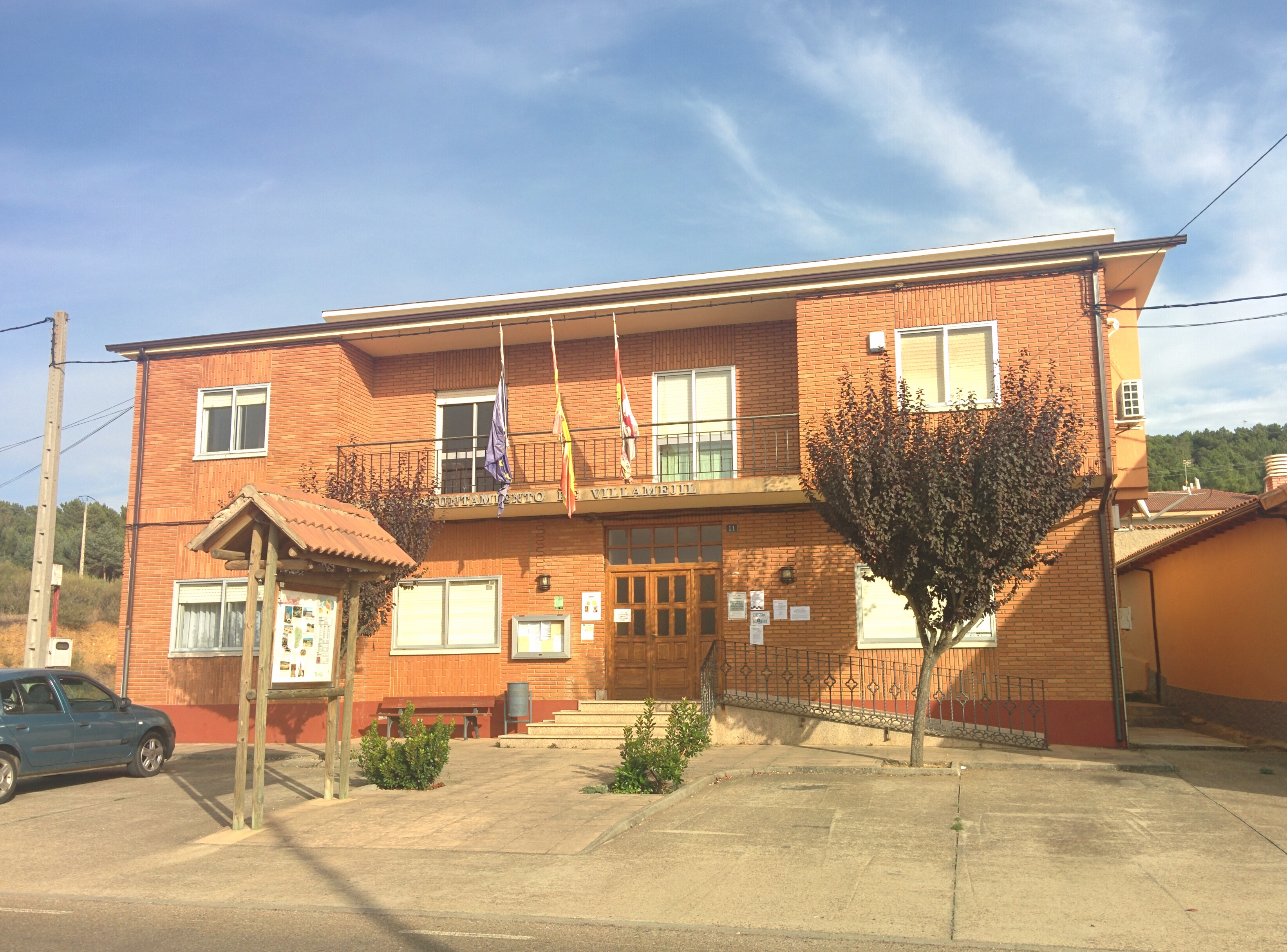 Casa consistorial de Villamejil (León, España).